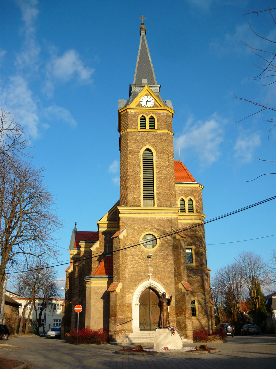 Szent Mihály-templom, Rákosszentmihály, Budapest